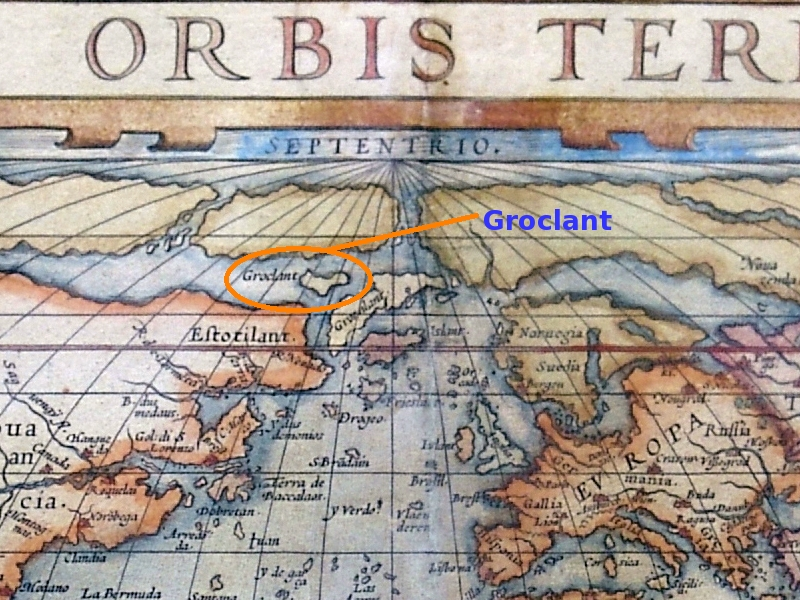 Señal de la isla fantasma Groclant, al oeste de Groenlandia, en un mapa de Ortelius de 1572